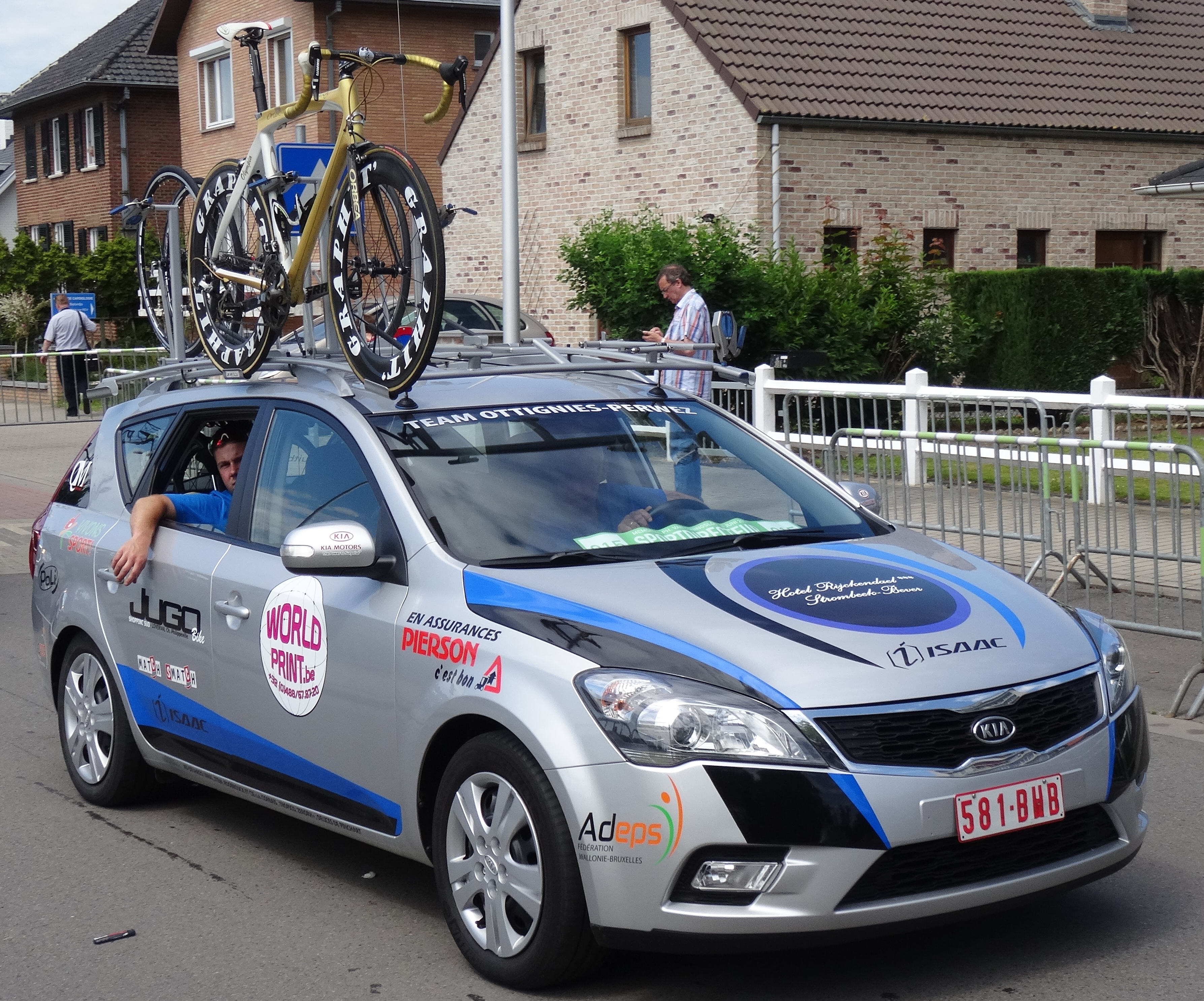 Reportage photographique réalisé le dimanche 8 juin à l'occasion du départ du Mémorial Philippe Van Coningsloo 2014 à Wavre, Belgique.